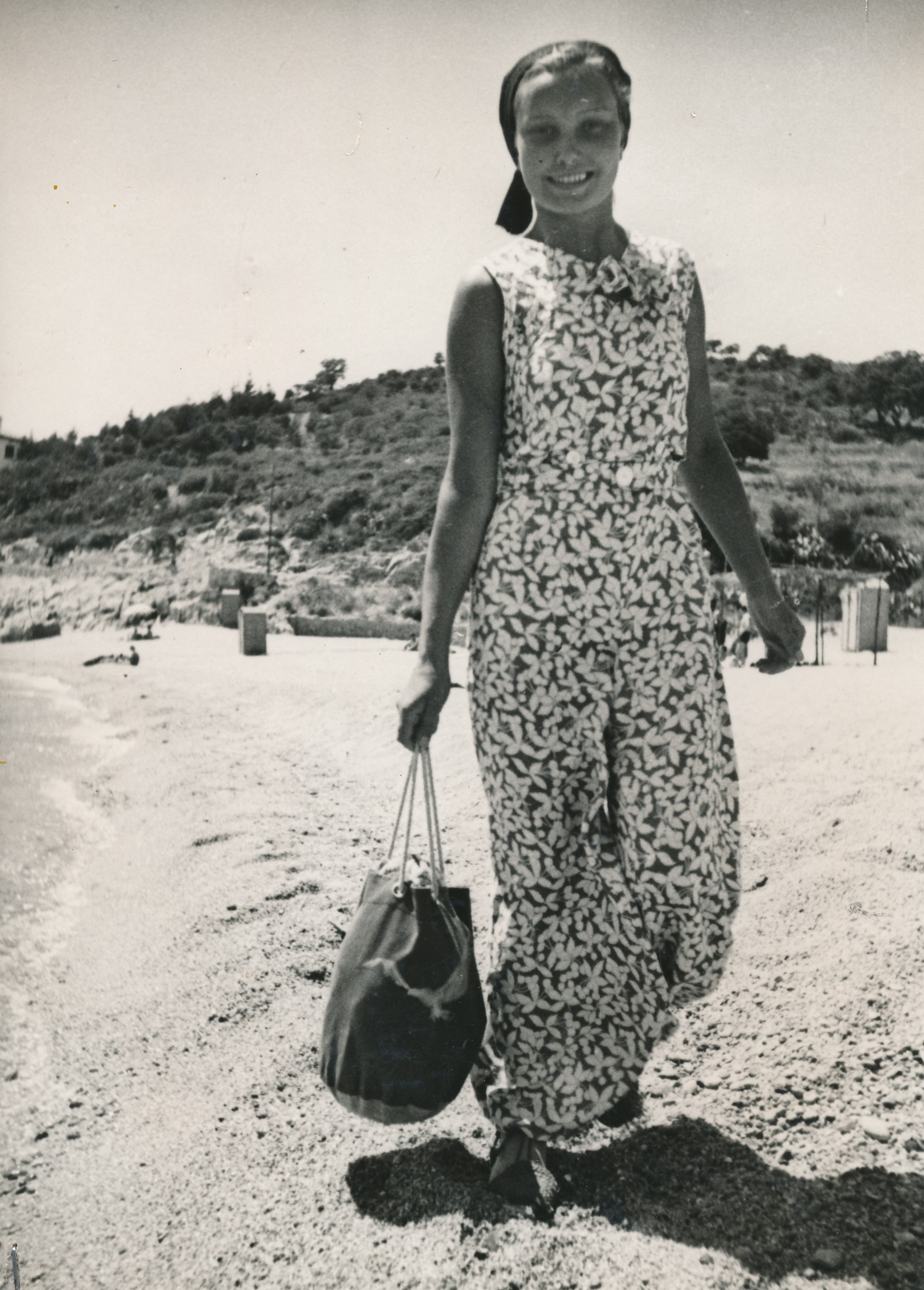 Costa Brava (Girona) Procedencia: Archivo Fotográfico de la Dirección General de Turismo (1951-1992) Fotógrafo: Conitz Registro nº: 00528 Signatura: Caja 6 Fondos: Biblioteca de la Facultad de Empresa y Gestión Pública (Universidad de Zaragoza) Legado: Luis Fernández Fuster / E.S. Turismo Huesca